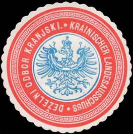 Sealing stamp Title: Krainischer Landesausschuss Description: blau, rot, weiß, geprägt Place: Laibach size: 4 cm